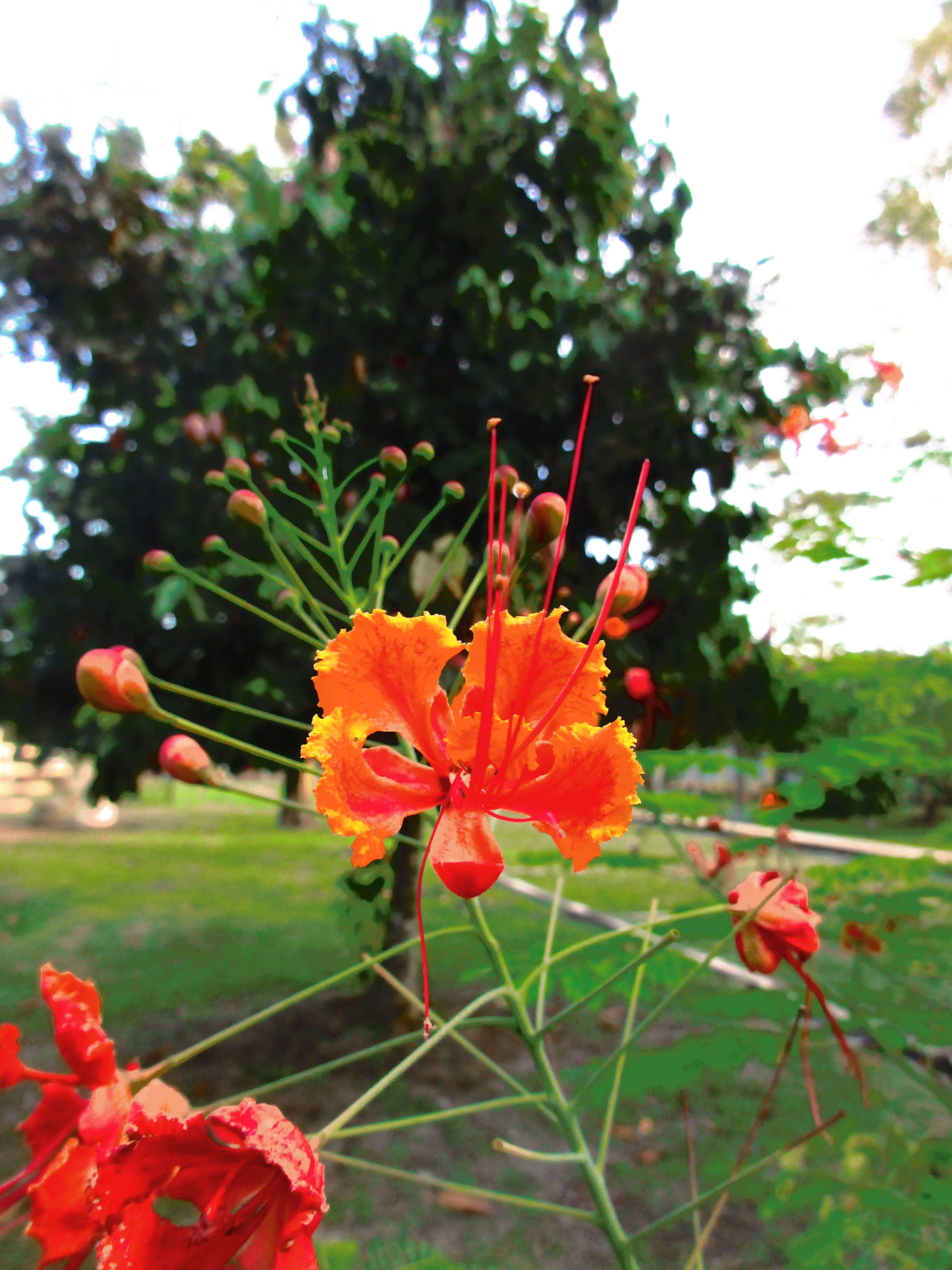 Acacia loretensis en Los Paucares Inn, Iquitos, Perú